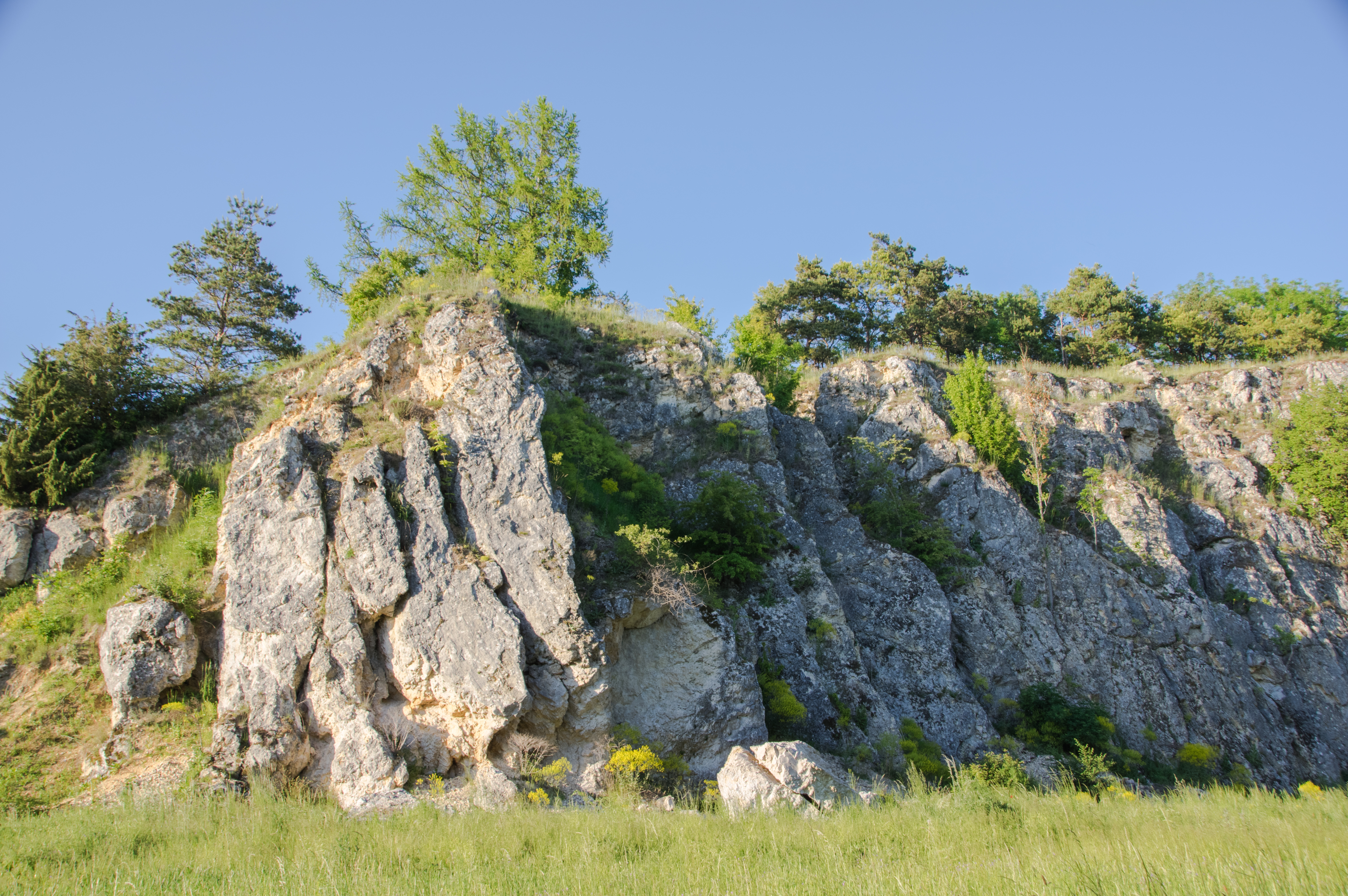 Teilansicht der Aufschlusskante des ehemal. Steinbruchs von Norden her, deutlich sichtbar die Verwerfungen bedingt durch den Ries-Impakt.